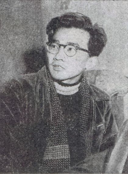 扶桑社『週刊サンケイ』2月16日号(1958)より開高健